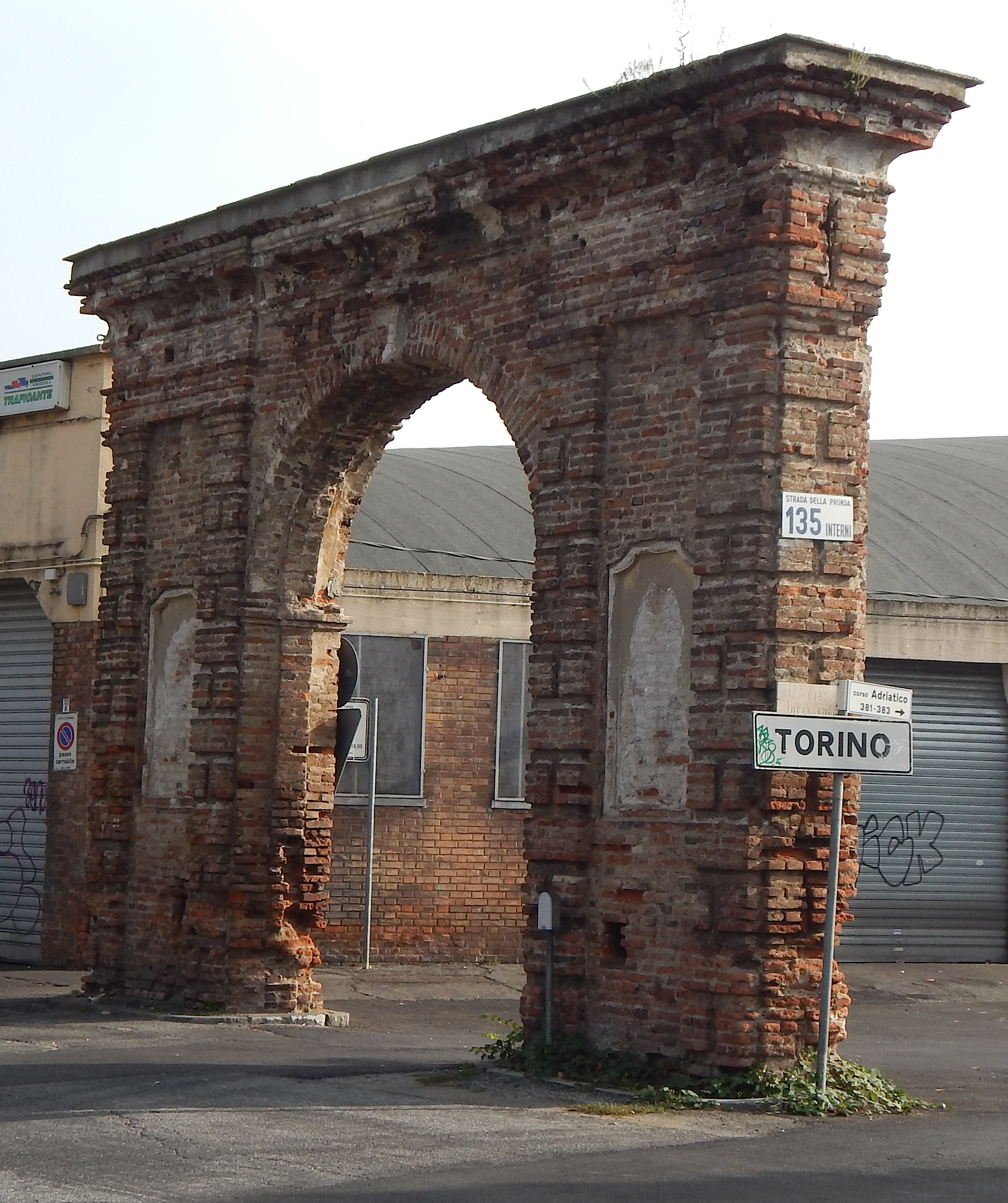 Una veduta di Borgata Lesna, Torino e Grugliasco[1] Licensing Sources ↑ source